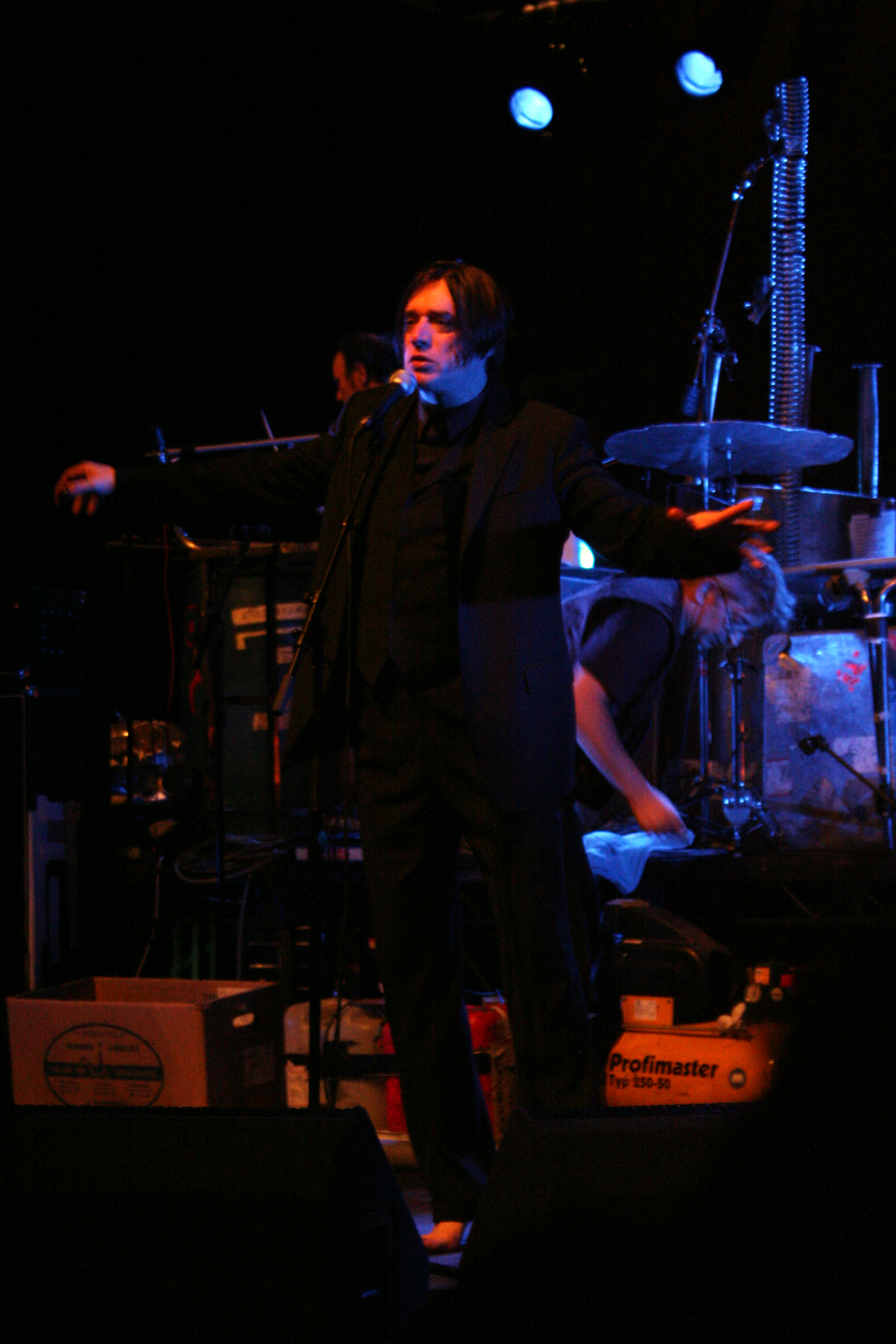 Бликса Баргельд в составе Einstürzende Neubauten, 25 апреля 2007